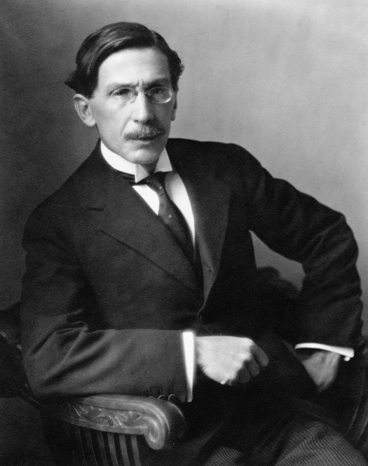 El escritor y Canciller de Venezuela, Manuel Díaz Rodríguez, posando como Delegado en la sede de la Sociedad de Naciones en Ginebra, Suiza.